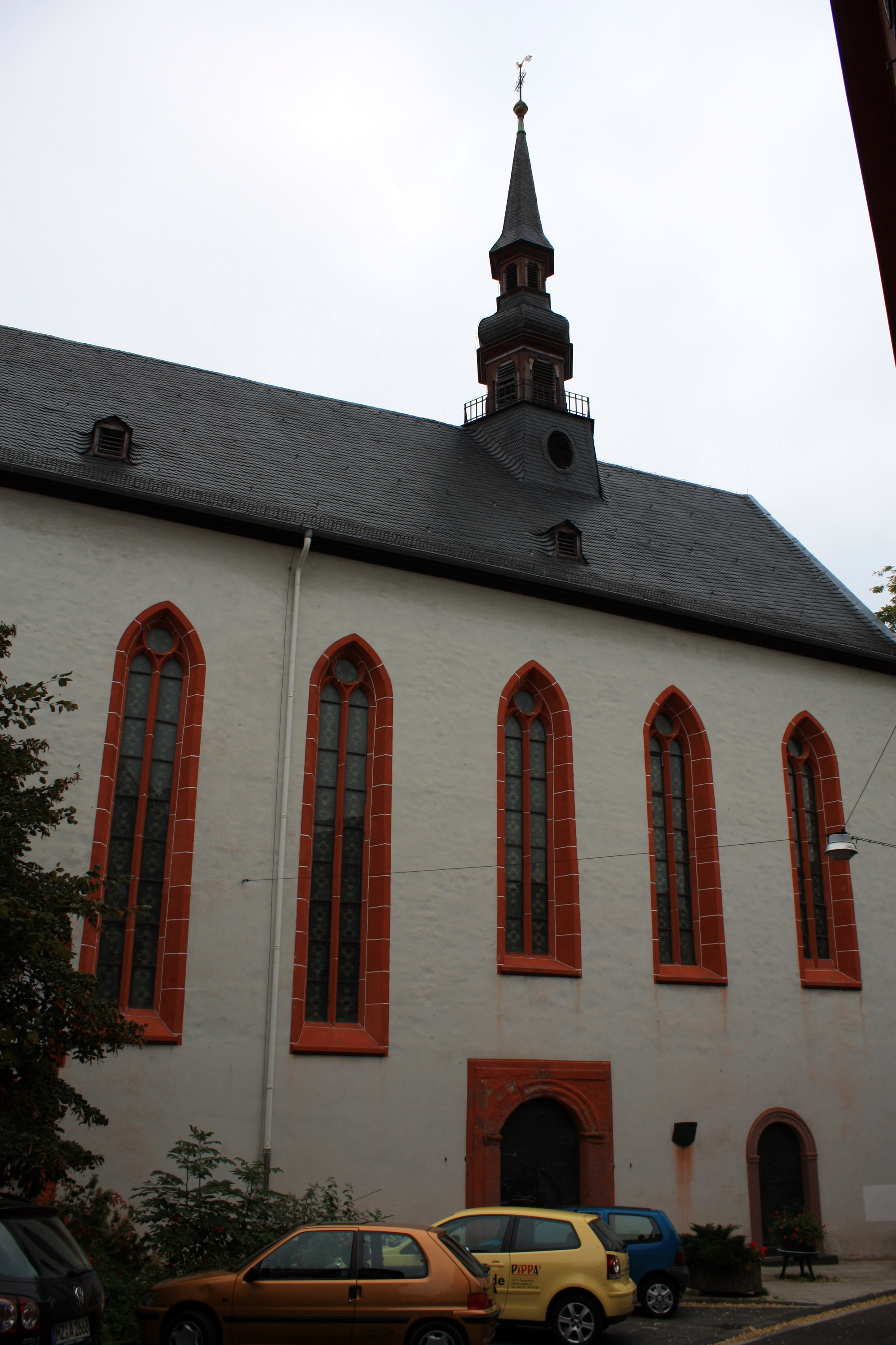 katholische Bartholomäuskirche in Oppenheim